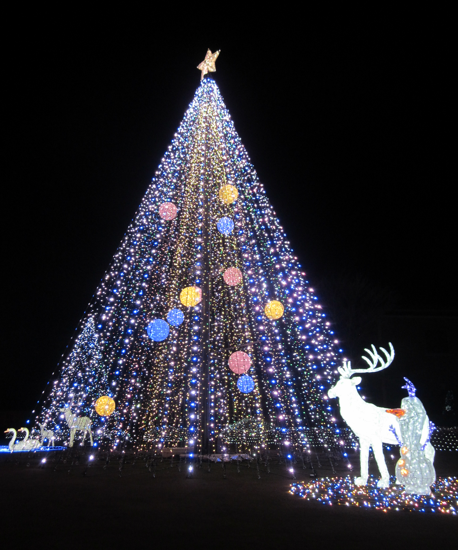 樫山工業株式会社のイルミネーション（光と音のファンタジー）